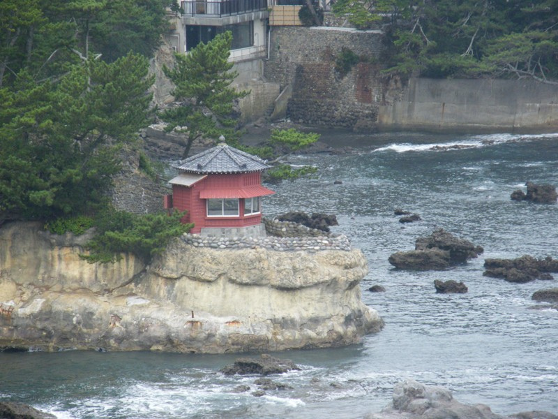 Rokkakudo in Kitaibaraki-city, Ibaraki-pref, JAPAN.